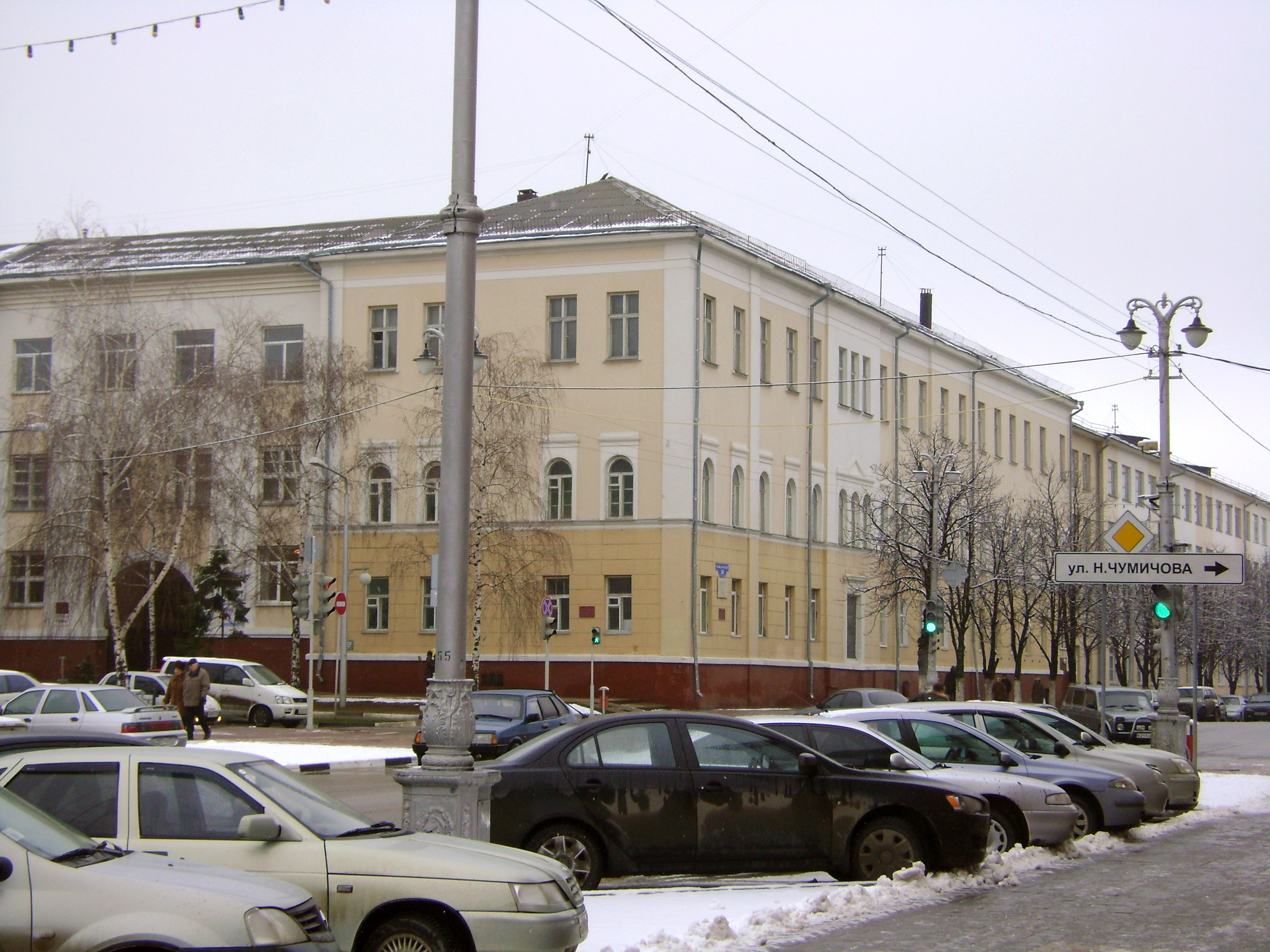 Здание Белгородского строительного колледжа, вид со стороны ул.Н.Чумичова